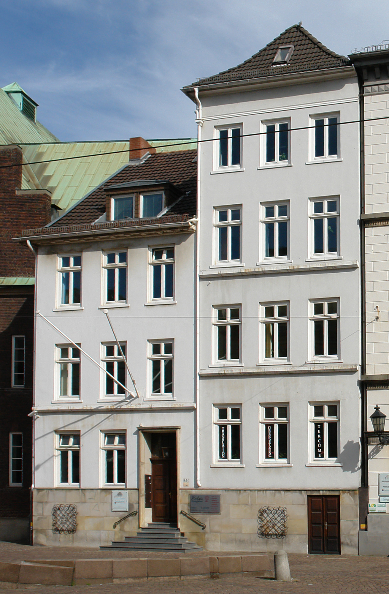 Geschäftshaus in Bremen, Domsheide 5+4. Das abgebildete Objekt ist ein geschütztes Kulturdenkmal in der Freien Hansestadt Bremen, mit der Nr. 0478 beim Landesamt für Denkmalpflege registriert. Das abgebildete Objekt ist ein geschütztes Kulturdenkmal in der Freien Hansestadt Bremen, mit der Nr. 0477 beim Landesamt für Denkmalpflege registriert.